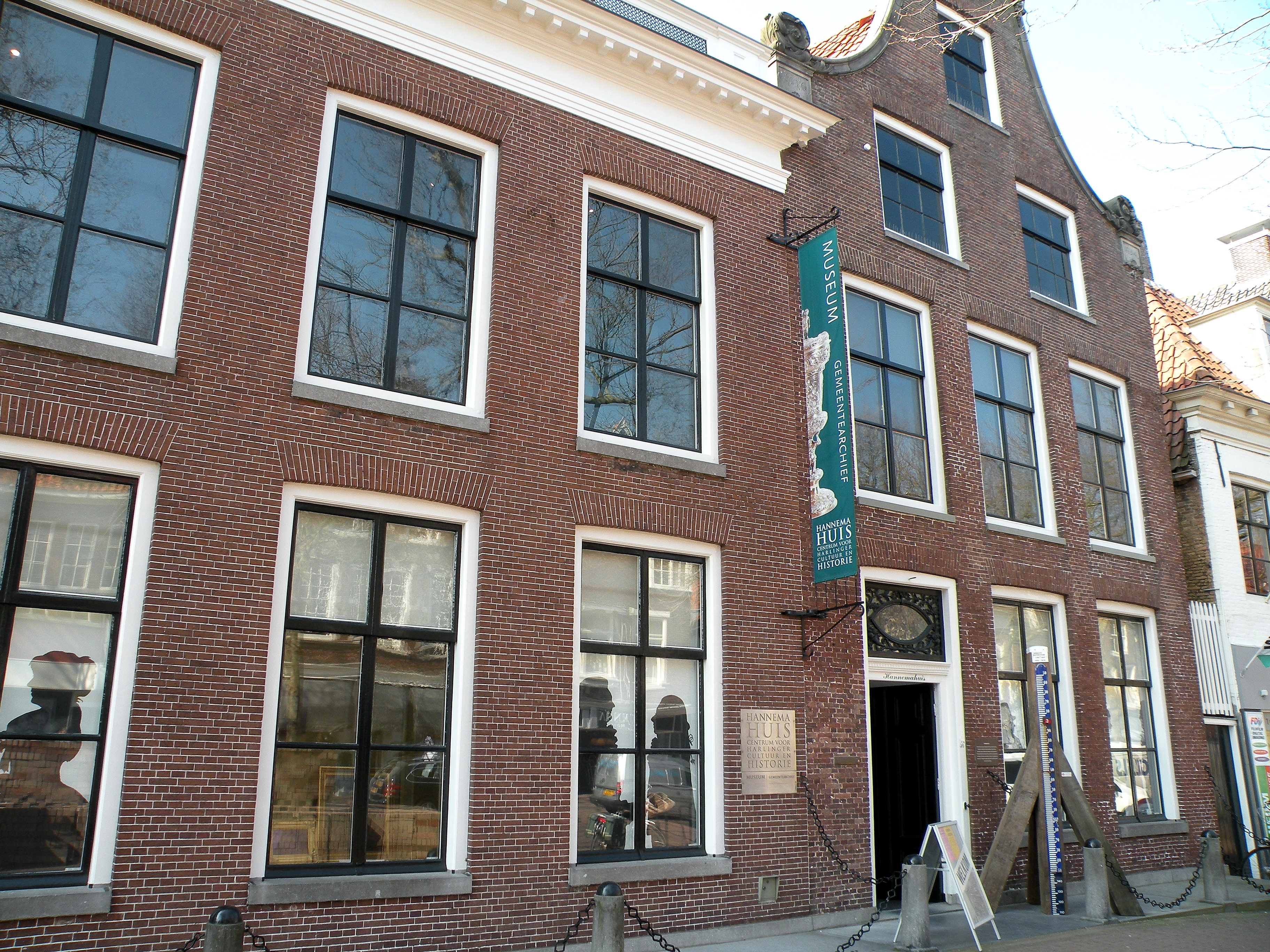 Harlingen, Voorstraat 56, Hannemahuis, Museum en gemeentearchief, Rijksmonument nr. 20730